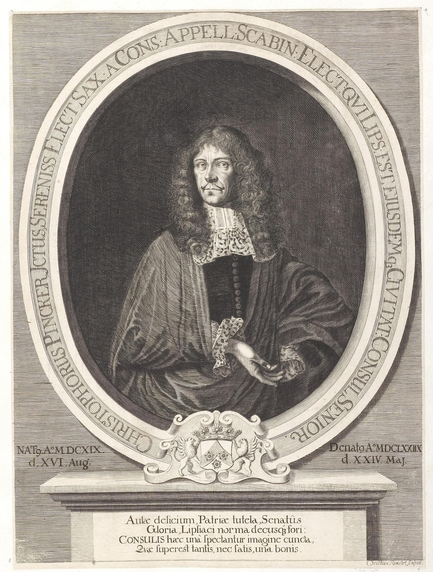 Grafik aus dem Klebeband Nr. 3 der Fürstlich Waldeckschen Hofbibliothek Arolsen Motiv: Christoph Pincker (1619–1678), sächsischer Jurist und zwischen 1655 und 1676 insgesamt achtmal Bürgermeister der Stadt Leipzig.